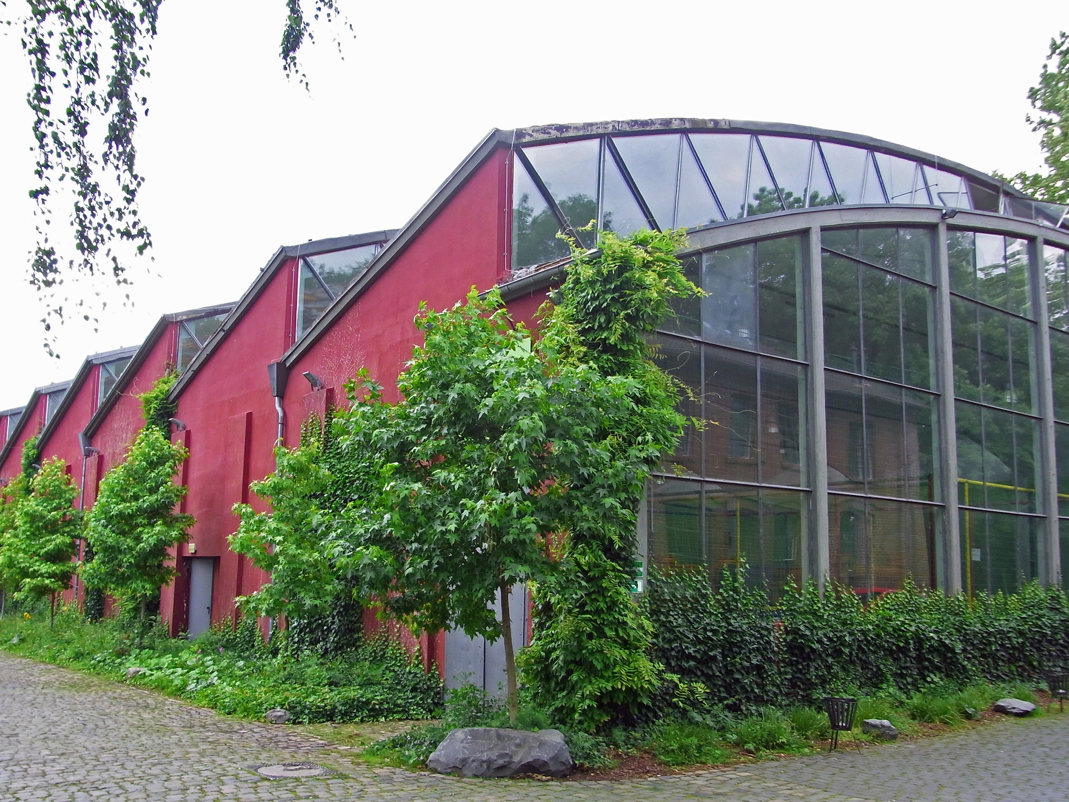 Textifabrik Elbers: Shedbogenhalle; Werkhalle zum Bedrucken von Geweben, 1956/7 unter Verwendung der alten Südwand. Südostansicht